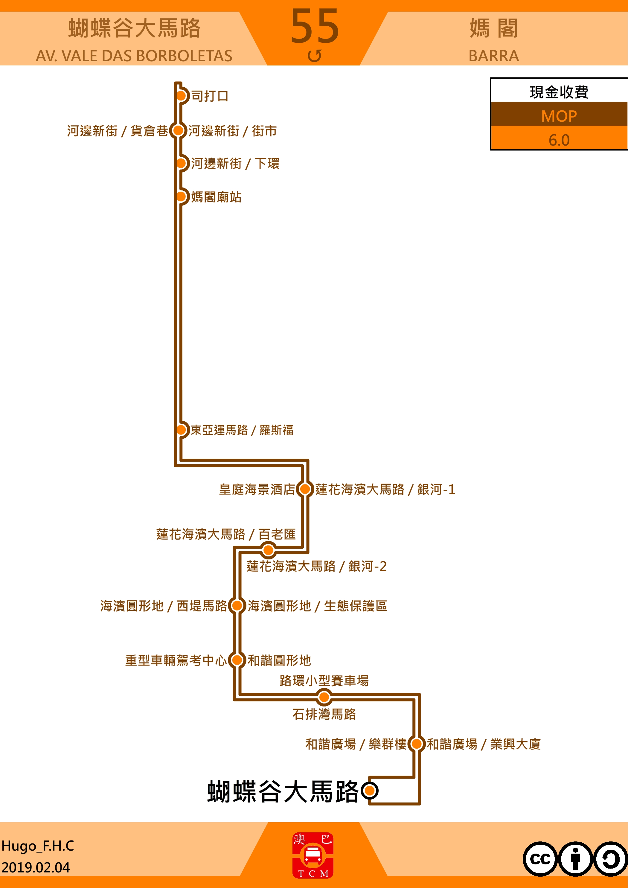 澳門巴士55走線圖